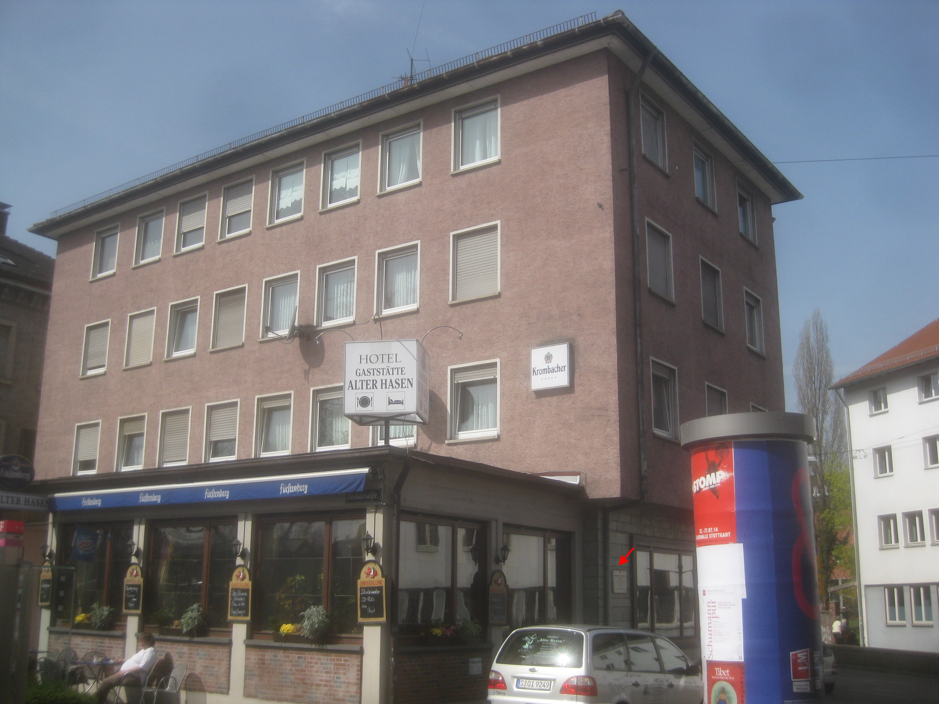 Wirtshaus „Alter Hasen“, Stuttgart-Bad Cannstatt, Neckartalstraße 73. Nach teilweiser Zerstörung im Zweiten Weltkrieg wurde das Haus wieder neu aufgebaut. In dem Haus starb am 18. März 1876 der Dichter Ferdinand Freiligrath. 1976 wurde eine Gedenktafel an dem Haus angebracht (roter Pfeil).